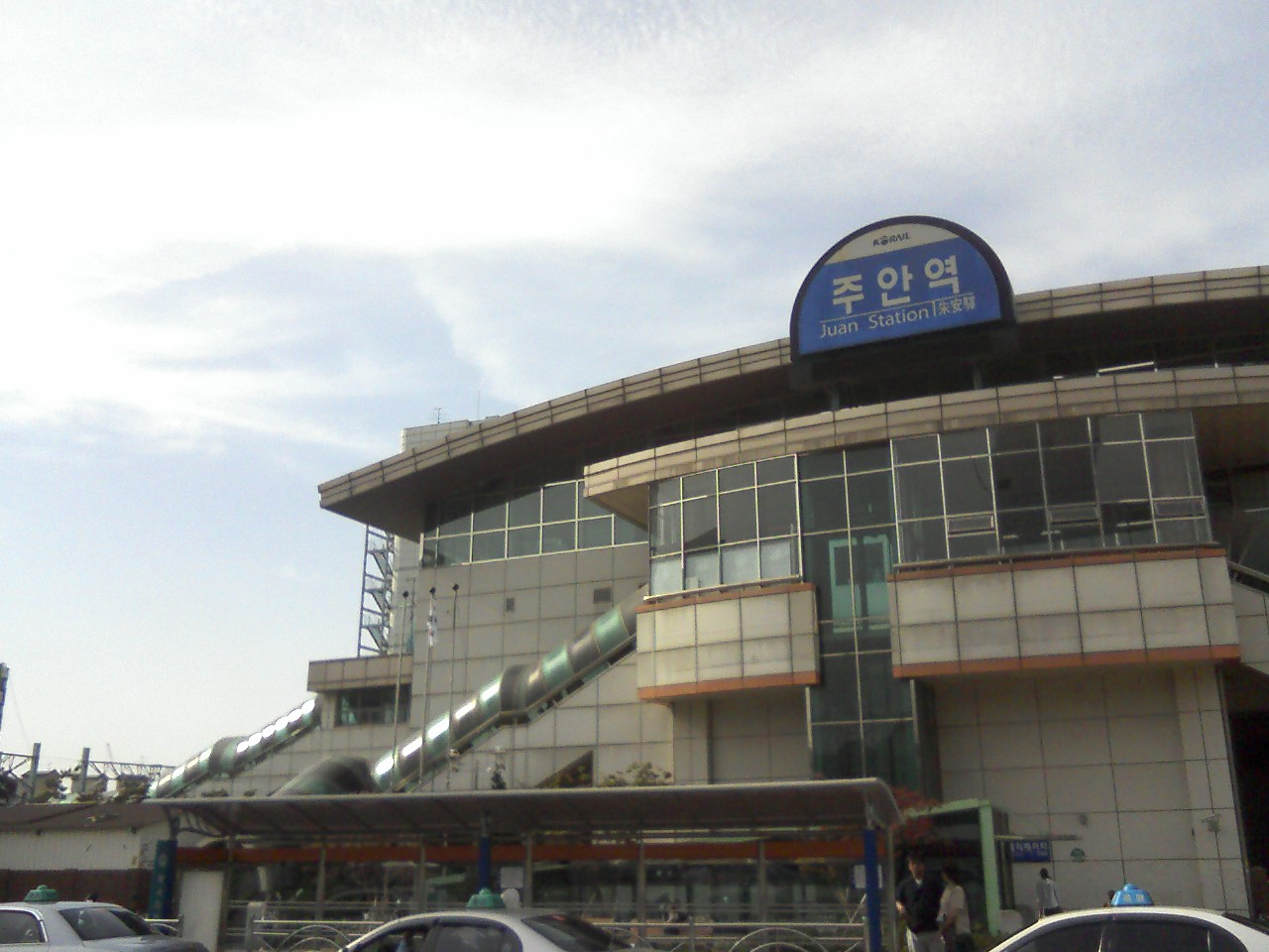 수도권 전철 1호선 주안역 남쪽 출구